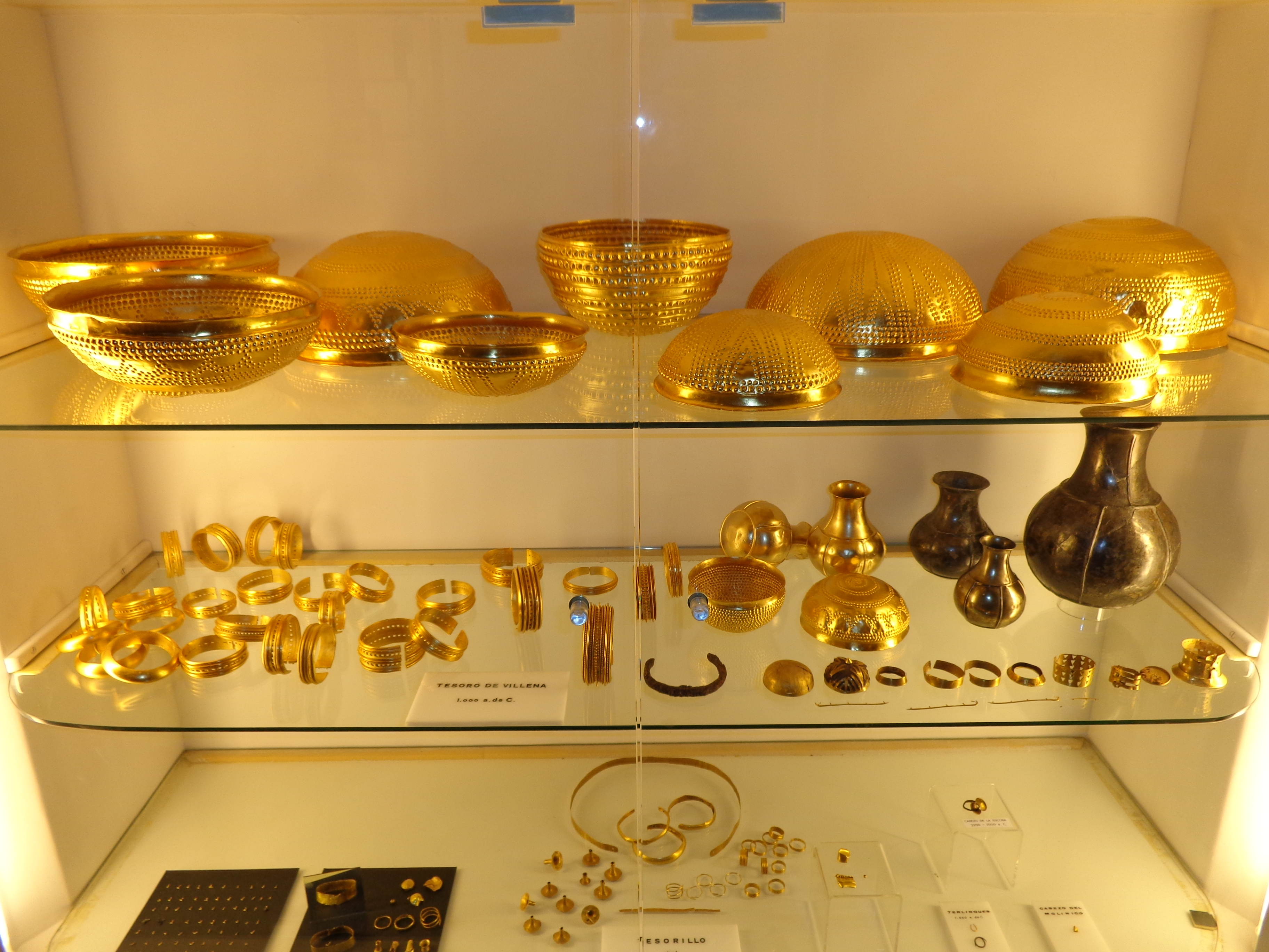 Tesoro di Villena